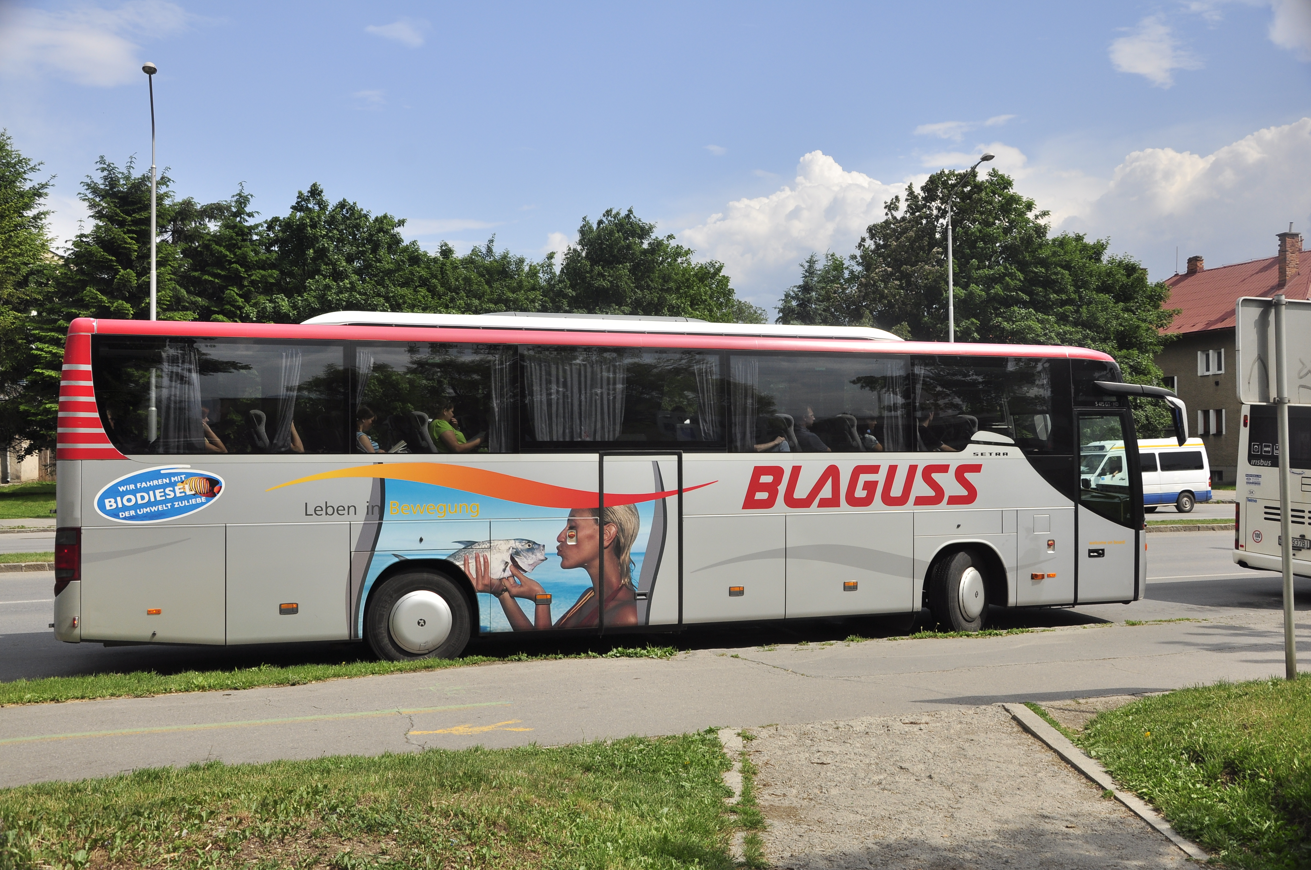 Autobus Setra S 415 GT-HD dopravcu Blaguss